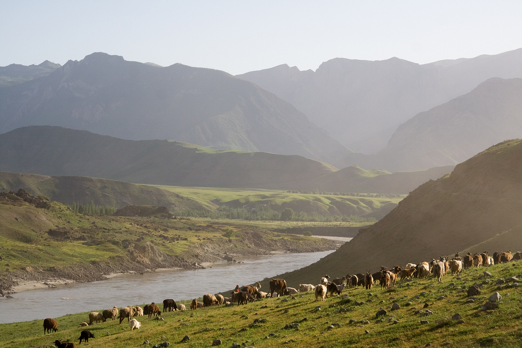 Maḩall-i shogan poyen,Муҳалла-и шоган поиён